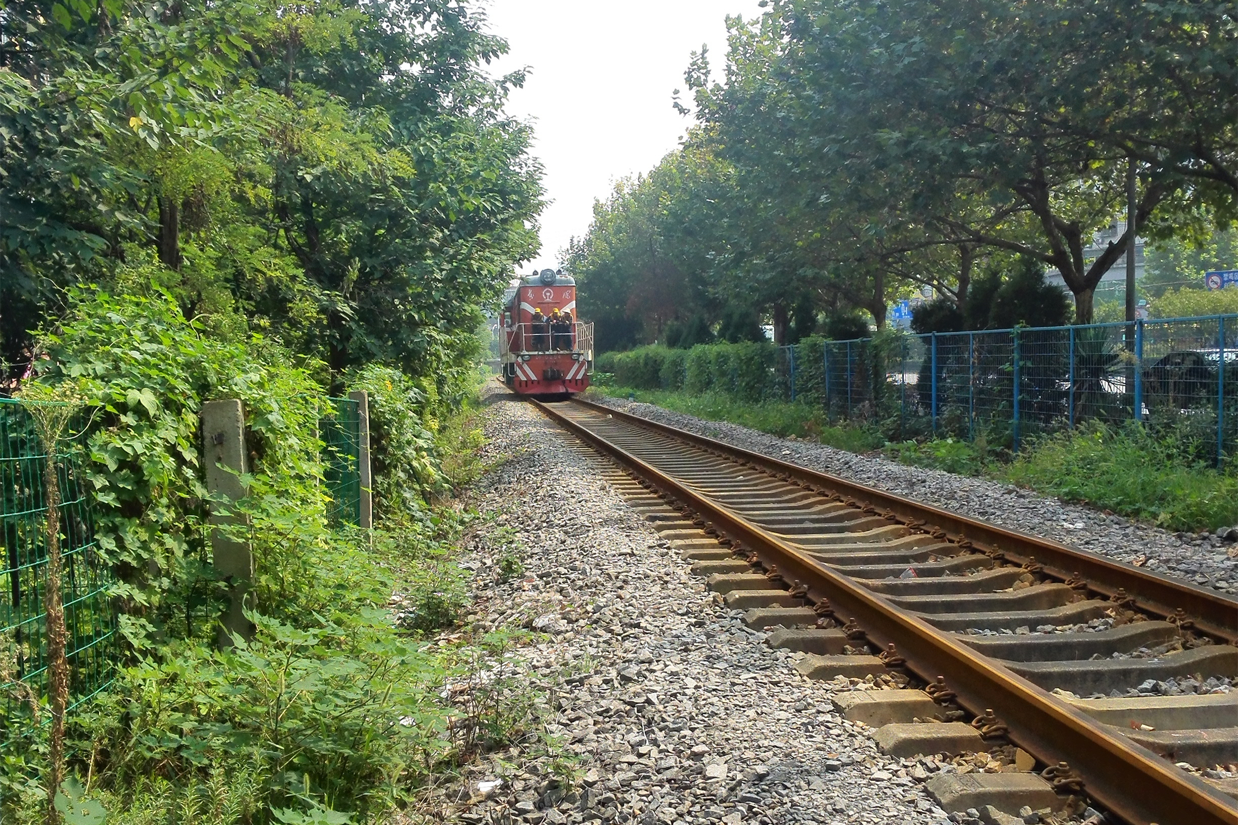 中文（中国大陆）: 编号为5254的东风7C型柴油机车行驶过黄石东线八卦嘴段。